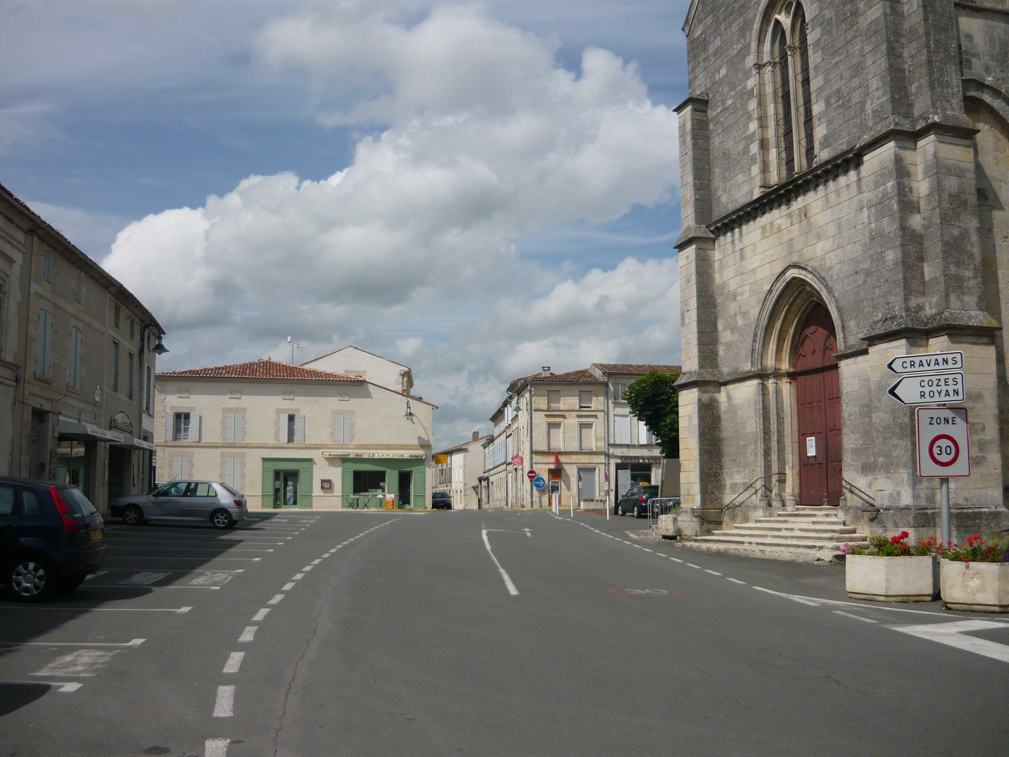 Rue principale de Gémozac (17).